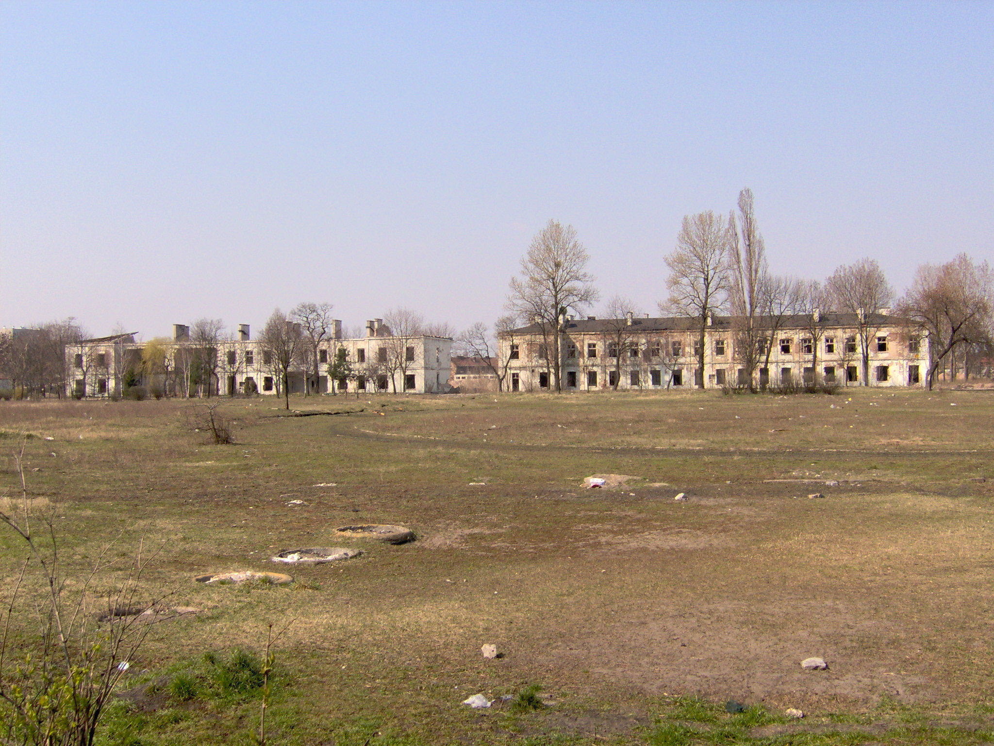 Pozostałości po byłej jednostki wojskowej przy ul. Żytniej 83 (2007 r.)